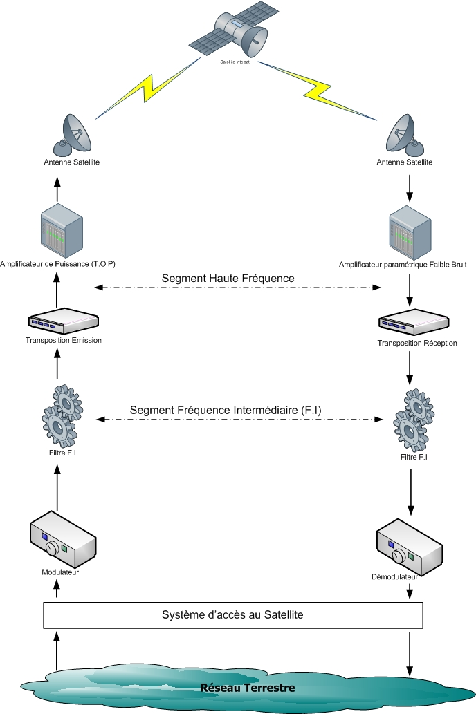 Synoptique liaison satellite